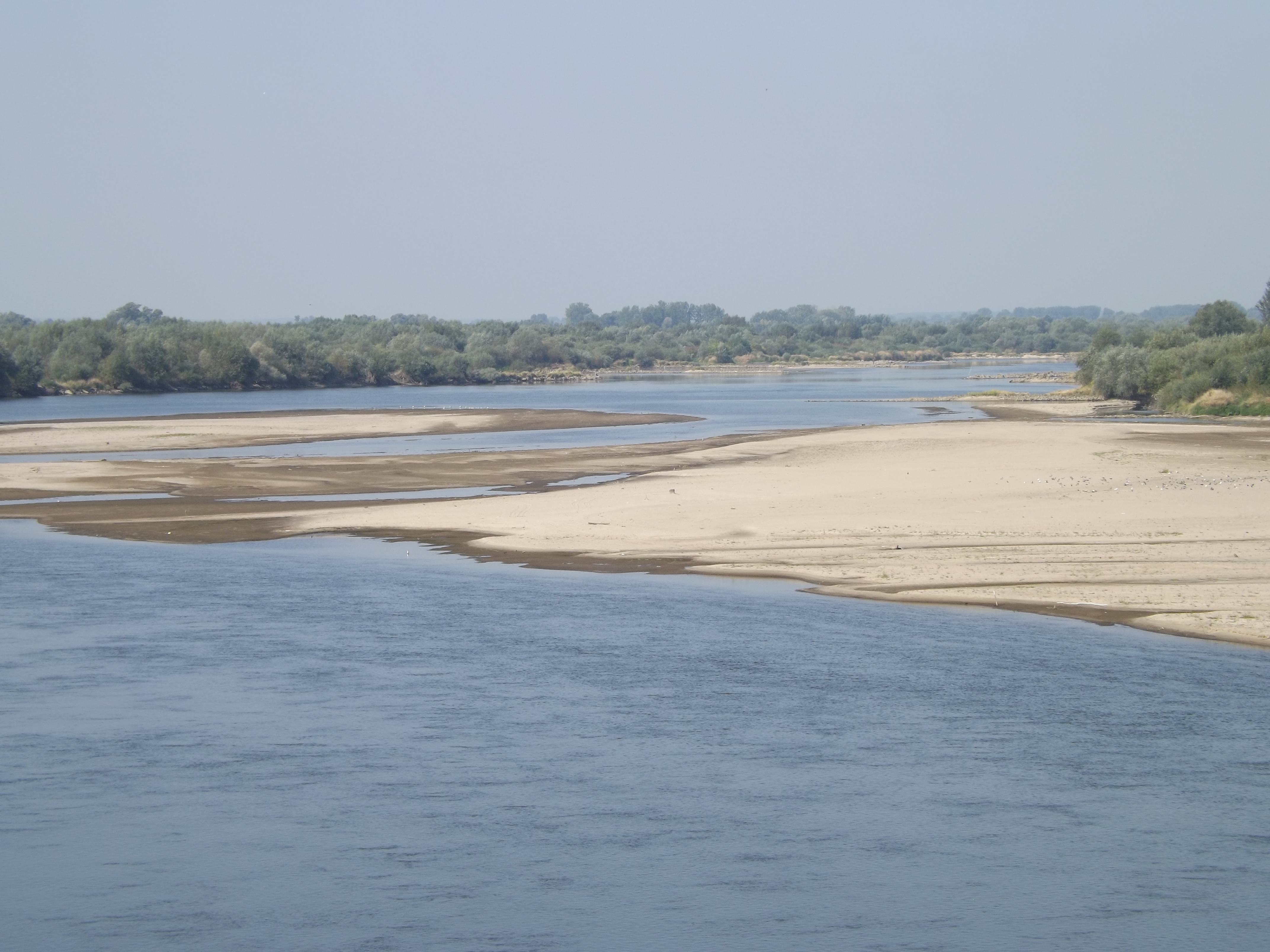 Wisła w rejonie Nagnajów Kępa Nagnajewska